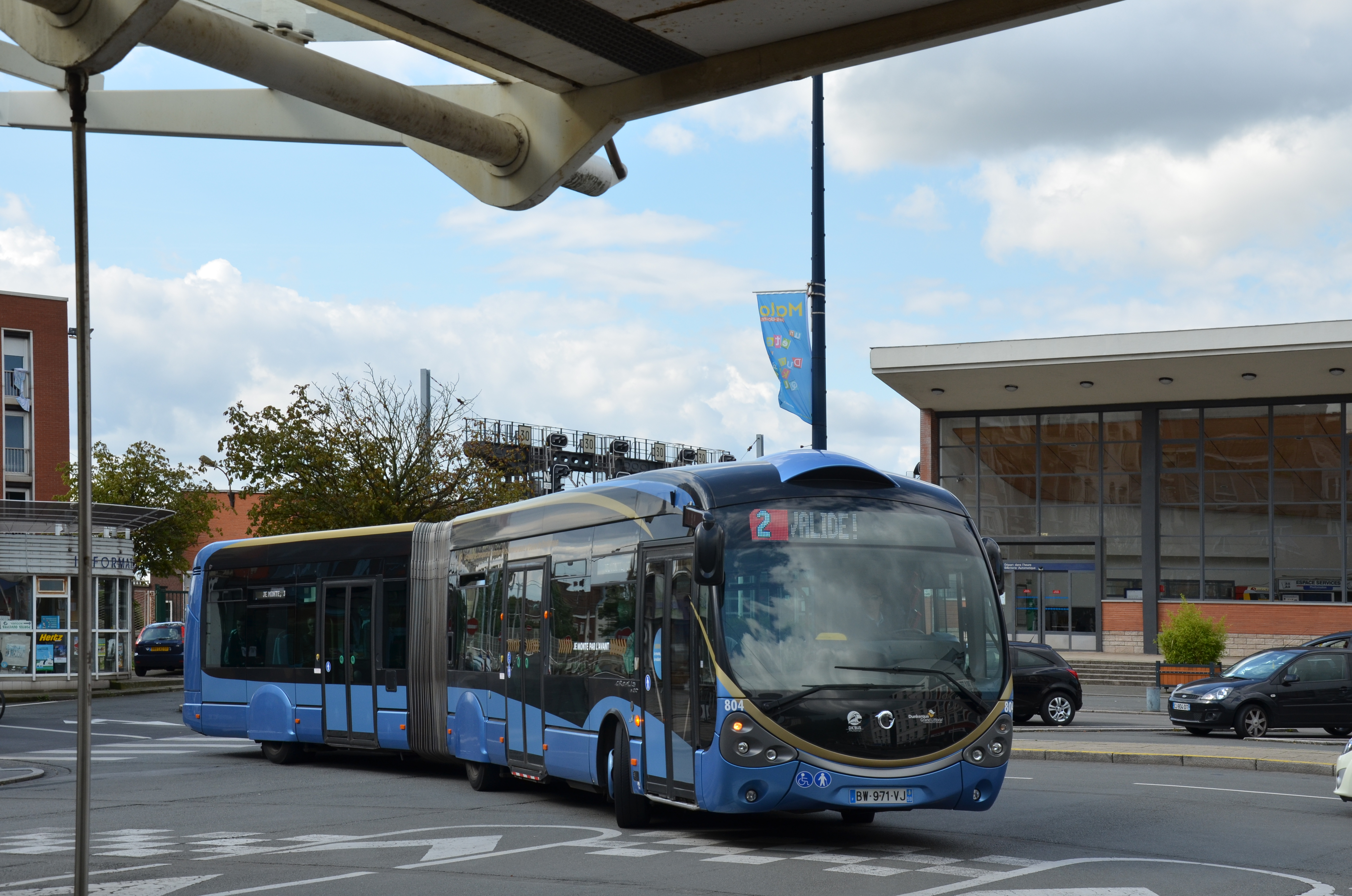 Irisbus Crealis Neo 18 n°804 du réseau DK'Bus, à l'arrêt Gare SNCF.